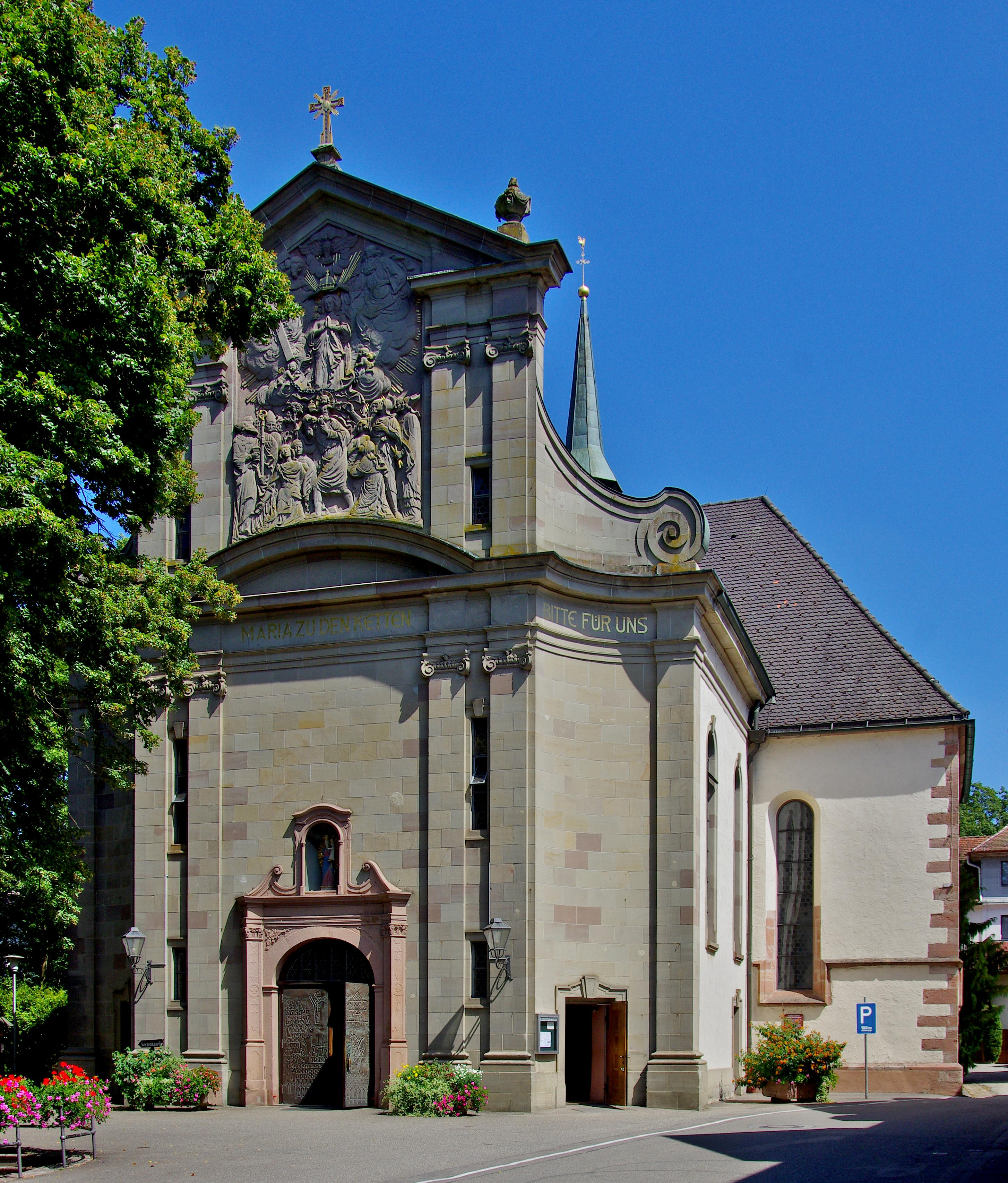 Zell am Harmersbach